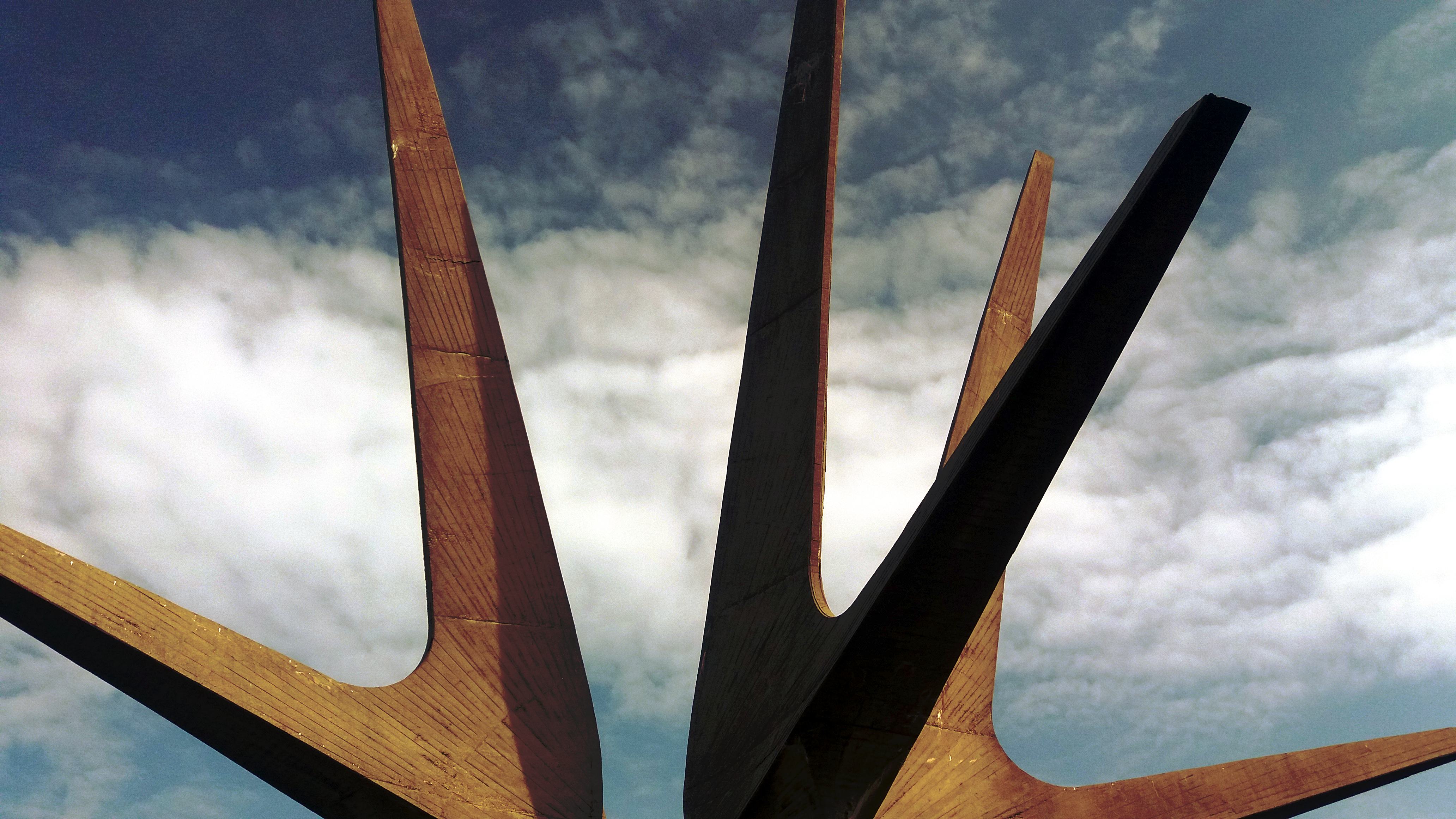 Srpskohrvatski / српскохрватски: Spomenik Kosmaj